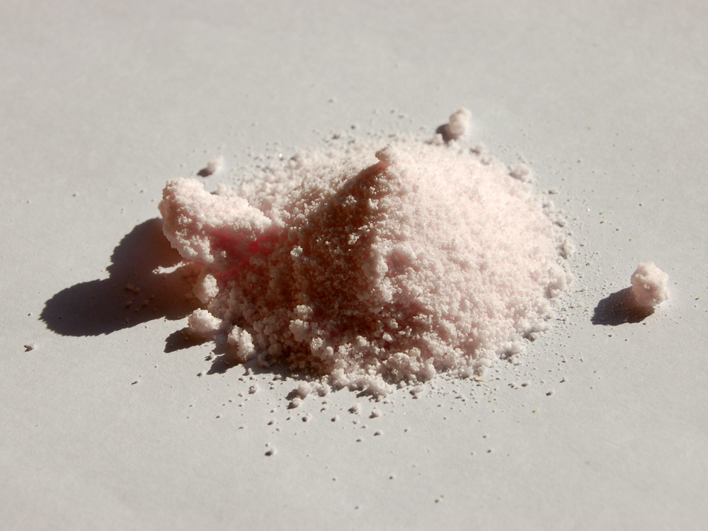 Manganese(II) sulfate tetrahydrate sample